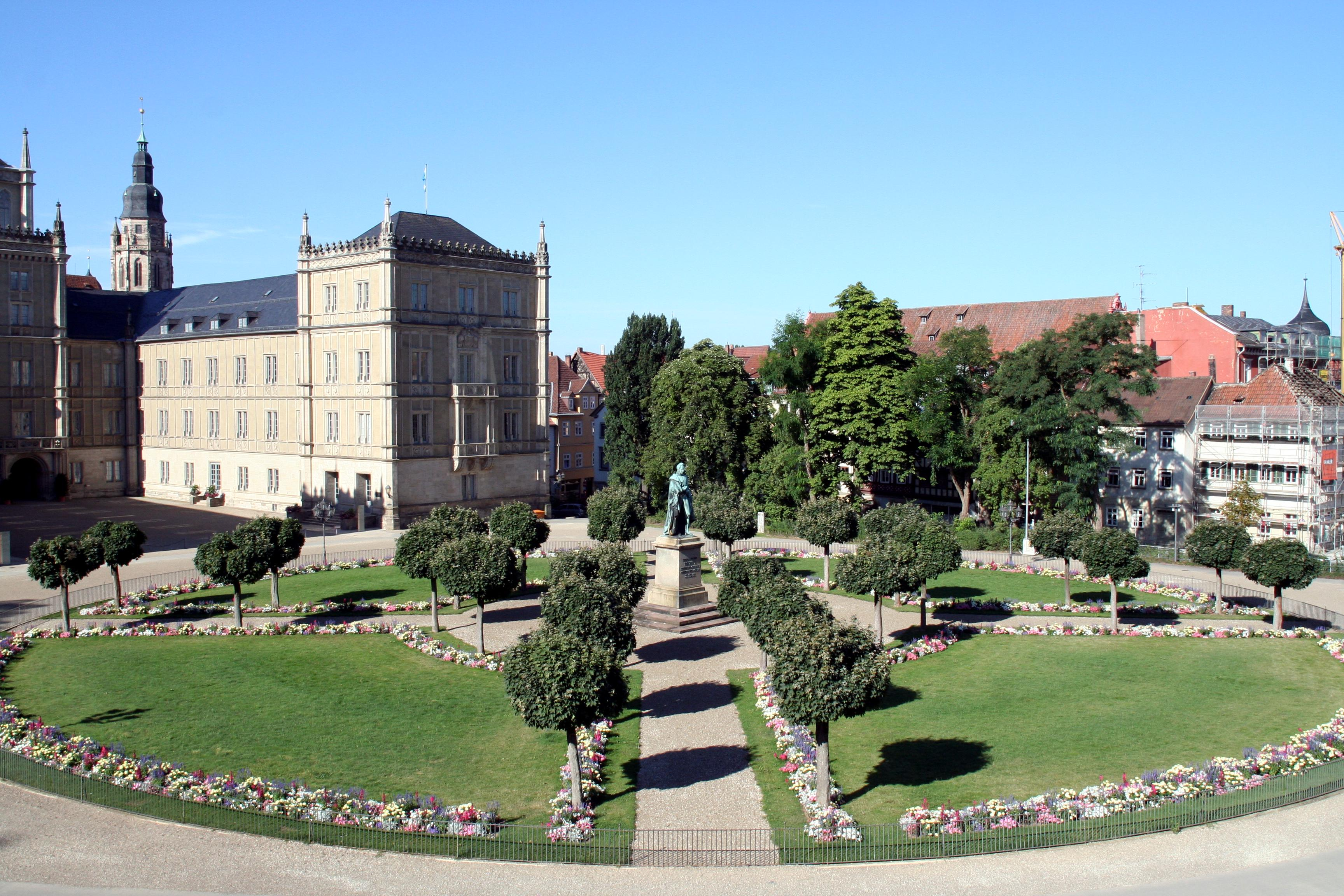 Schloßplatz in Coburg mit Denkmal Ernst I.